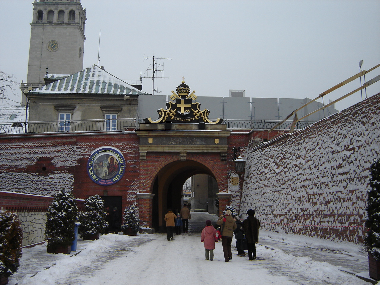 Jasna Góra-brama